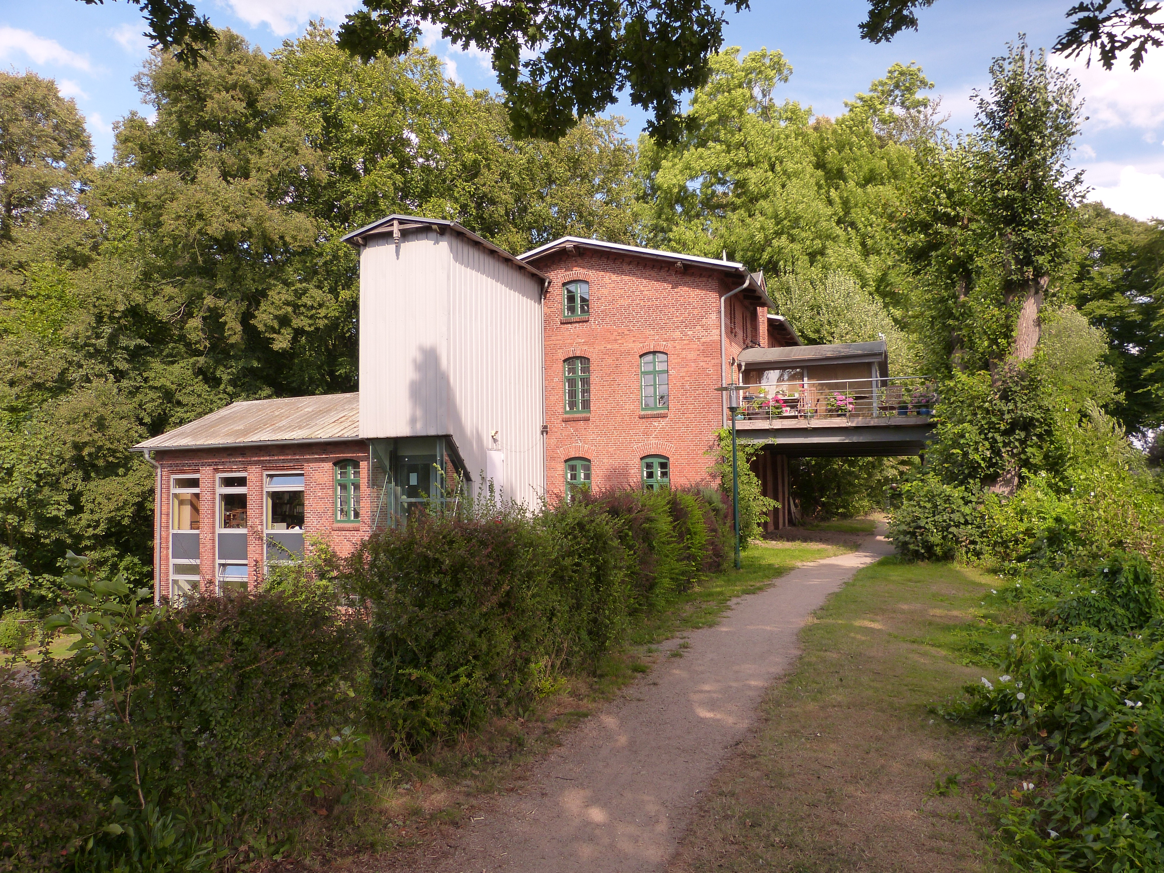 Wassermühle Weddelbrook von Westen aus.